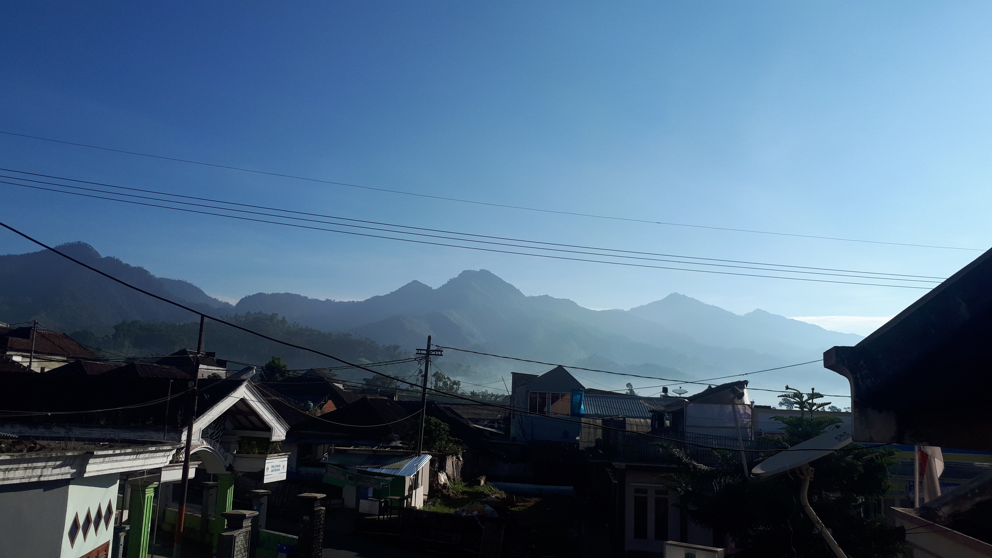 Kondisi Desa Ngabab